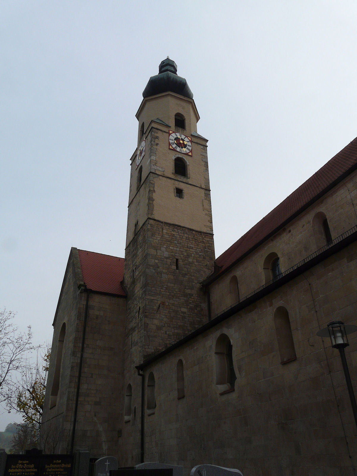 Kloster Windberg, Windberg, Niederbayern, Deutschland Kloster Windberg, Windberg, Bavaria, Germany